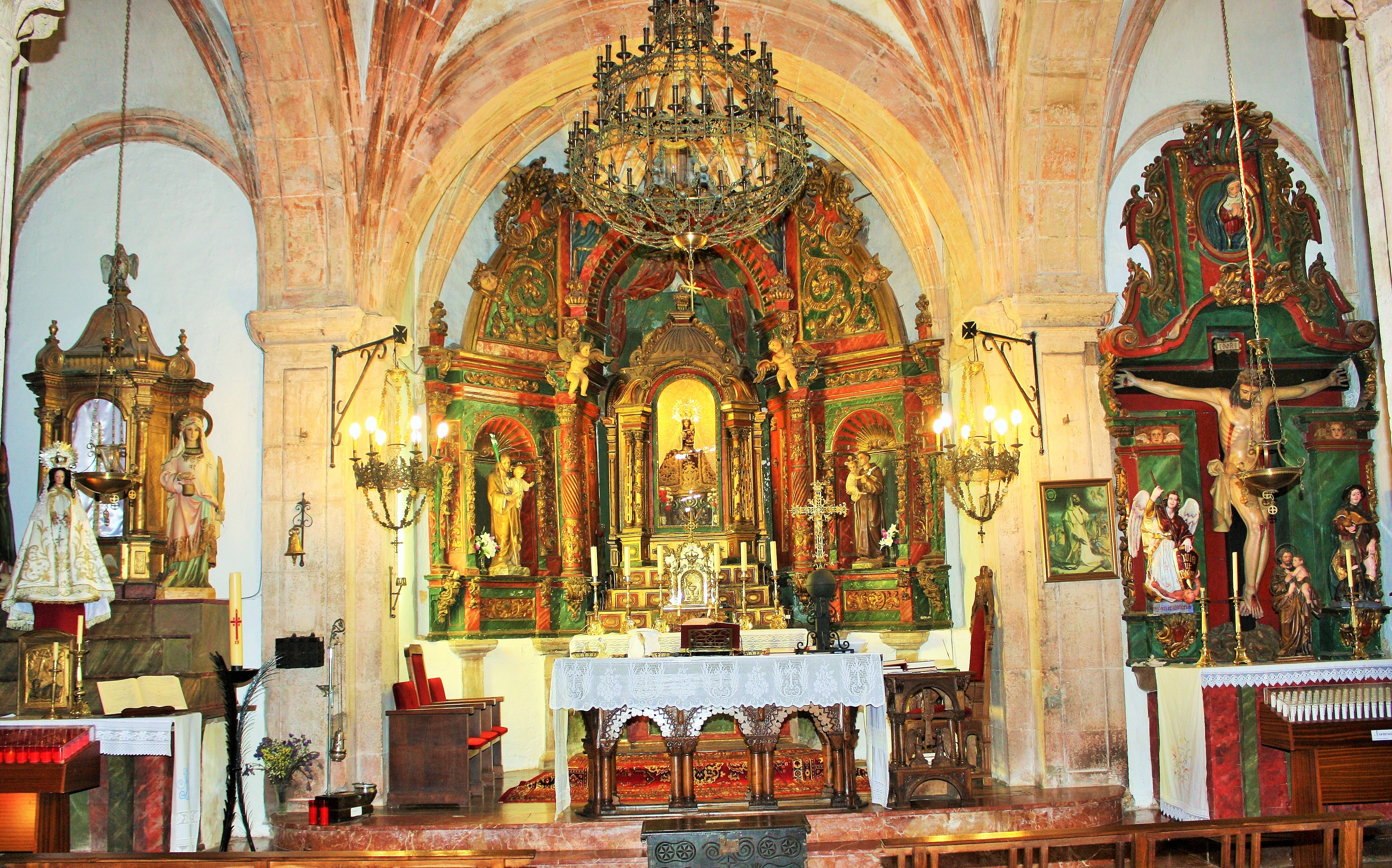 Santuario de Lugás. Villaviciosa. Asturias